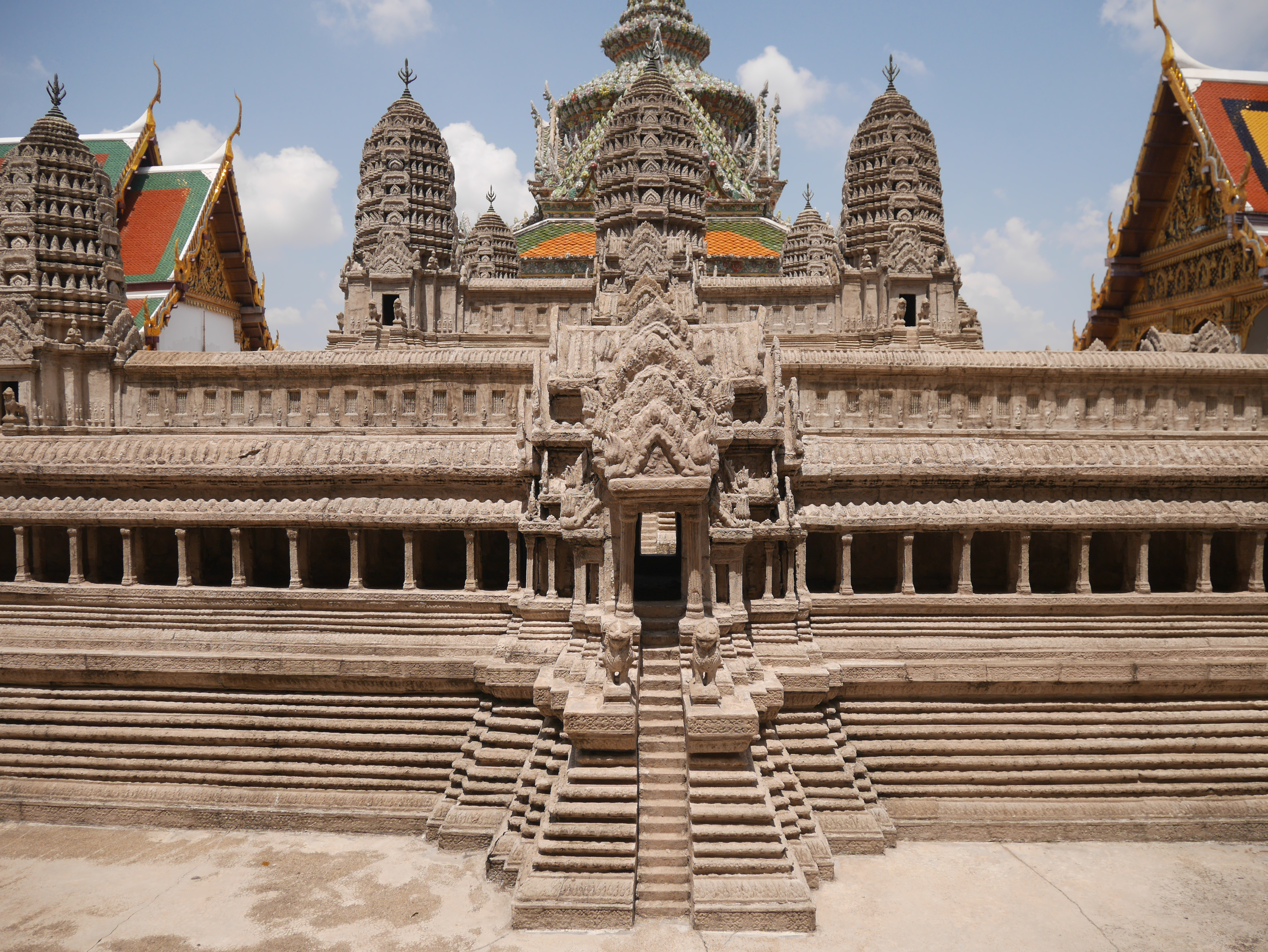 พระบรมมหาราชวังและวัดพระศรีรัตนศาสดาราม เจ้าของบัญชี กสิณธร ราชโอรส เป็นเจ้าของบัญชีเดียวกับ บัญชี Phonlakrit Sunthornphon ของ Facebook บัญชี Tsutomu RIkimi ของ Google และ Panoramio .com บัญชี ซูบารุโยของ กสิณธร ราชโอรส same account holder of Facebook (Phonlakrit Sunthornphon),Google and (Tsutomu RIkimi) and ซูบารุโย at